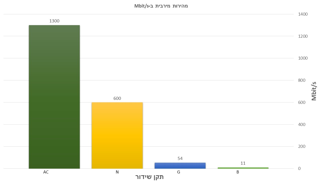 מהירות מירבית ביחס לתקן השידור